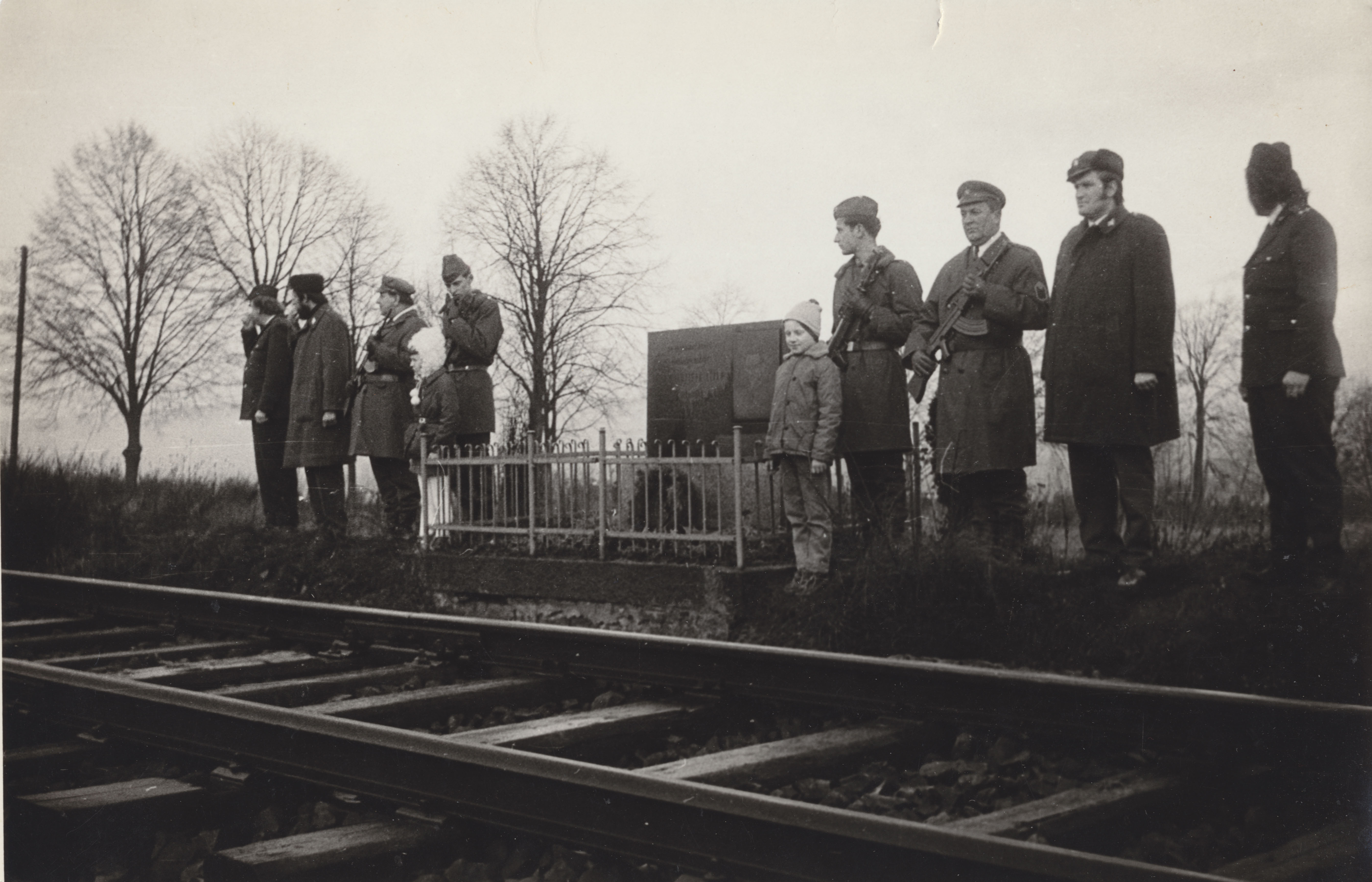 odhalení pomníku v roce 1975